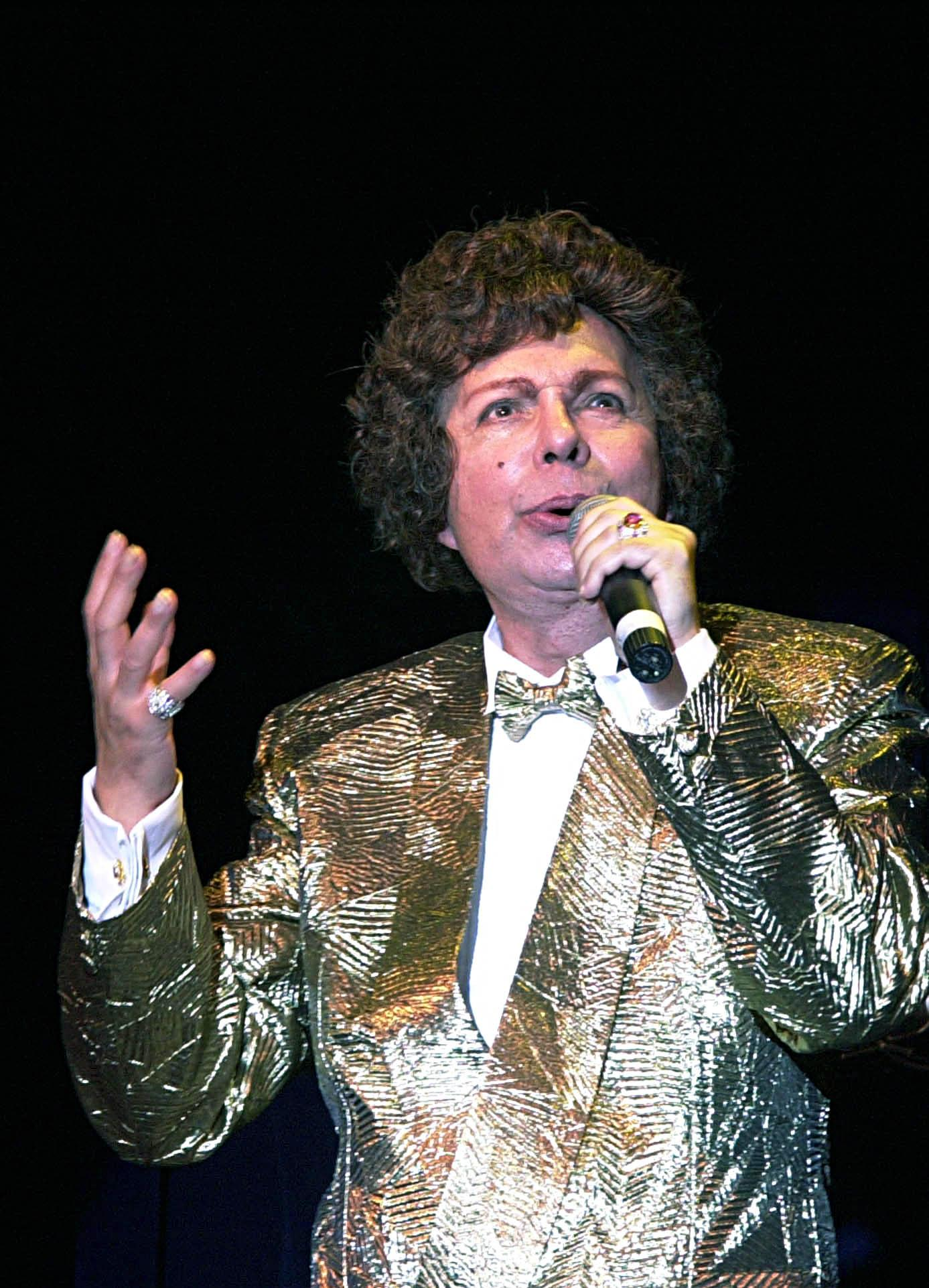 Rio de Janeiro - O cantor Cauby Peixoto canta durante espetáculo comemorativo na reinauguração da Nova Rádio Nacional.